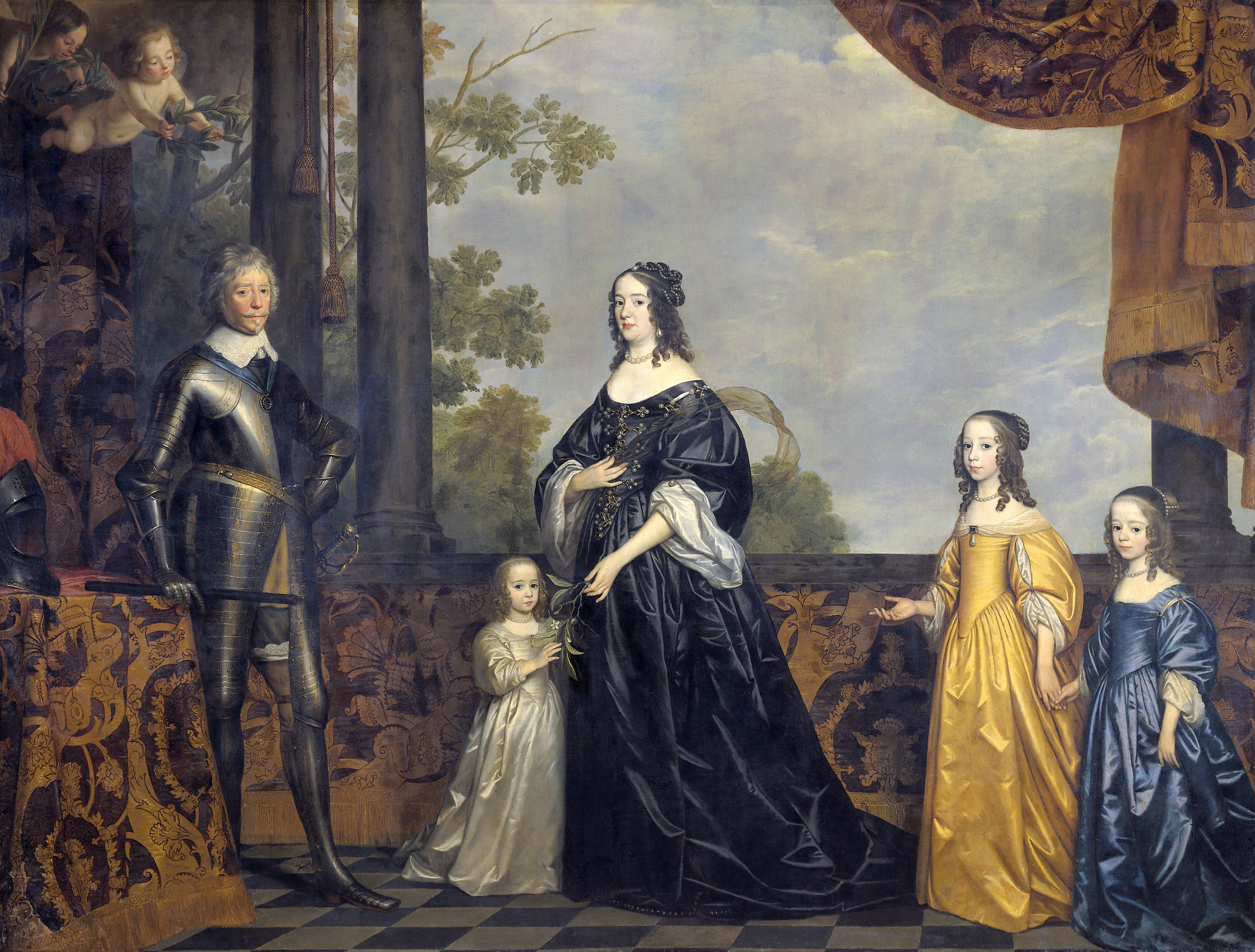 Part of a series, together with File:Gerrit van Honthorst - Portret van Friedrich Wilhelm I, keurvorst van Brandenburg (1620-1688) en zijn echtgenote Louise Henriette van Nassau (1627-1667) Rijksmuseum.jpg and File:Willem II prince of Orange and Maria Stuart-2.jpg.